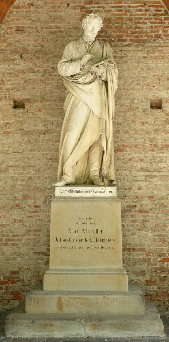 Grabstätte des Glasmalers Max Emanuel Ainmiller auf dem Alten Südfriedhof in München.